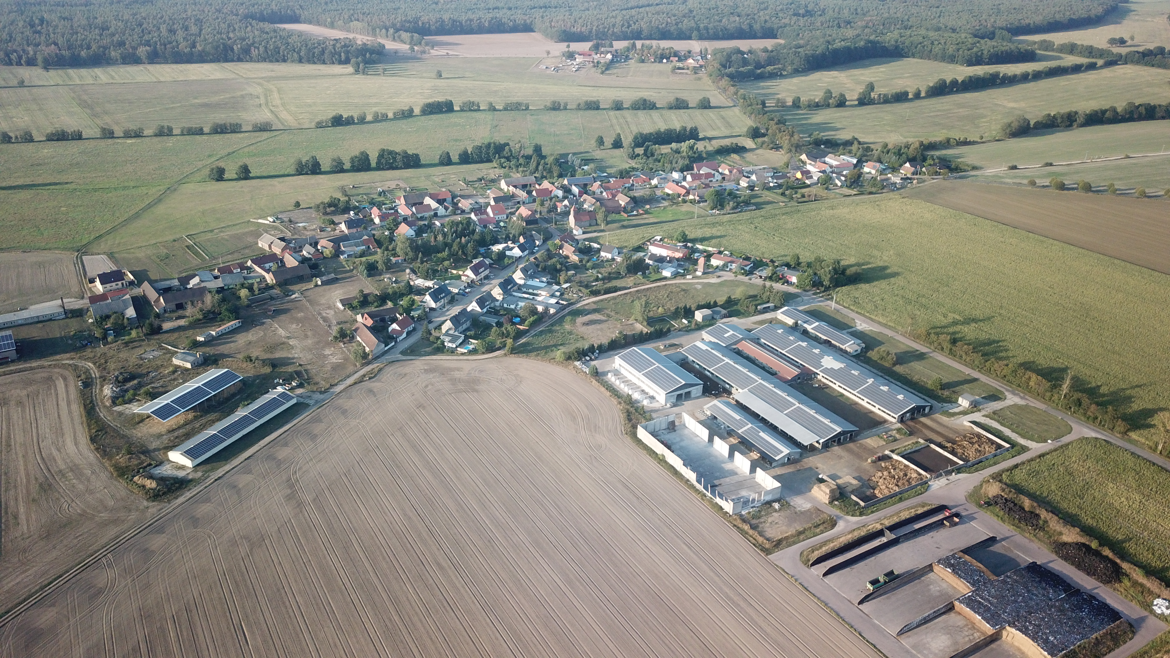 Luftaufnahme von Ragösen vom 22.8.19. Im Hintergrund ist der ehemalige Ortsteil Krakau zu sehen.